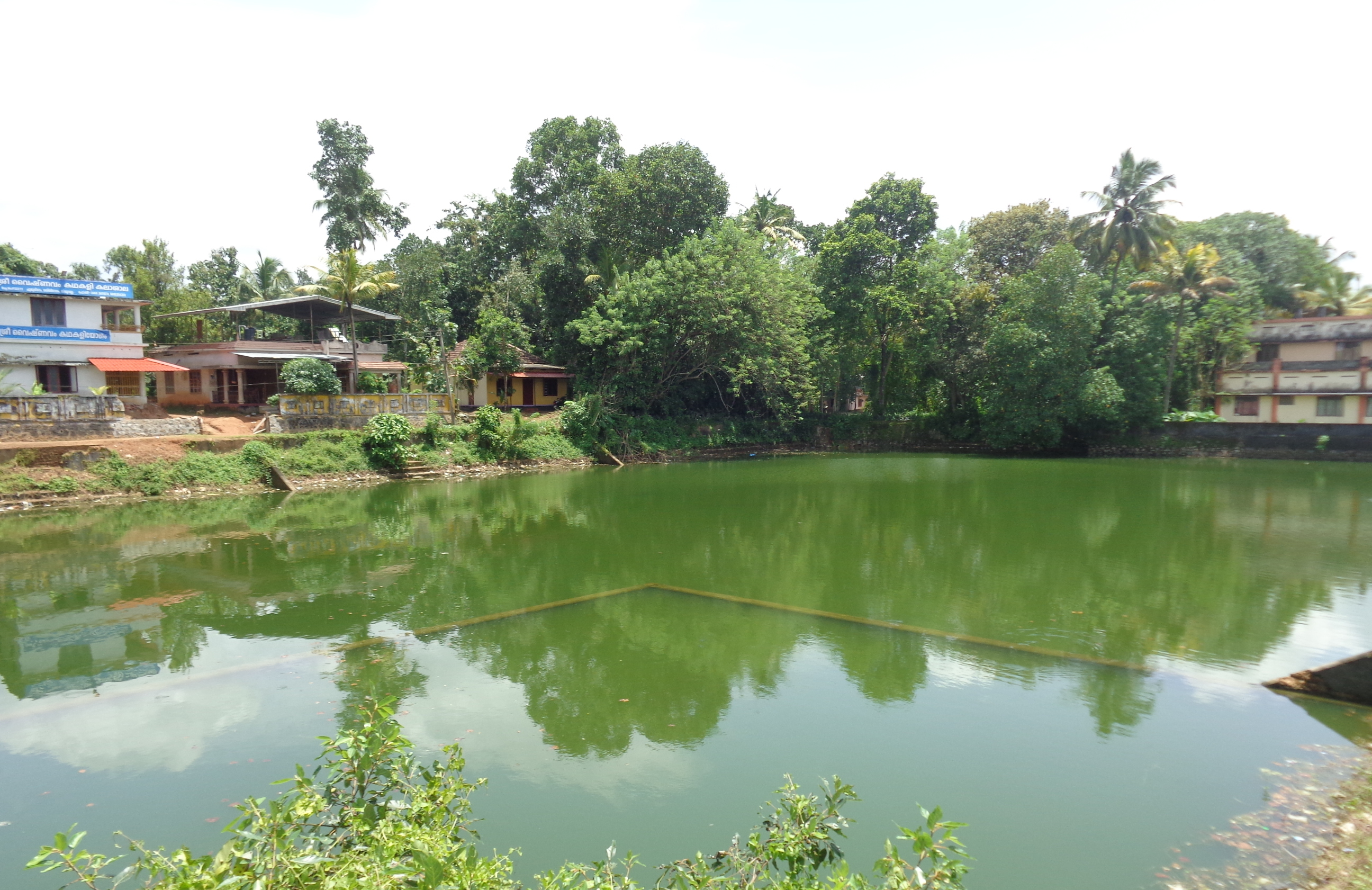 sreevallabha temple, thiruvalla, temple pond